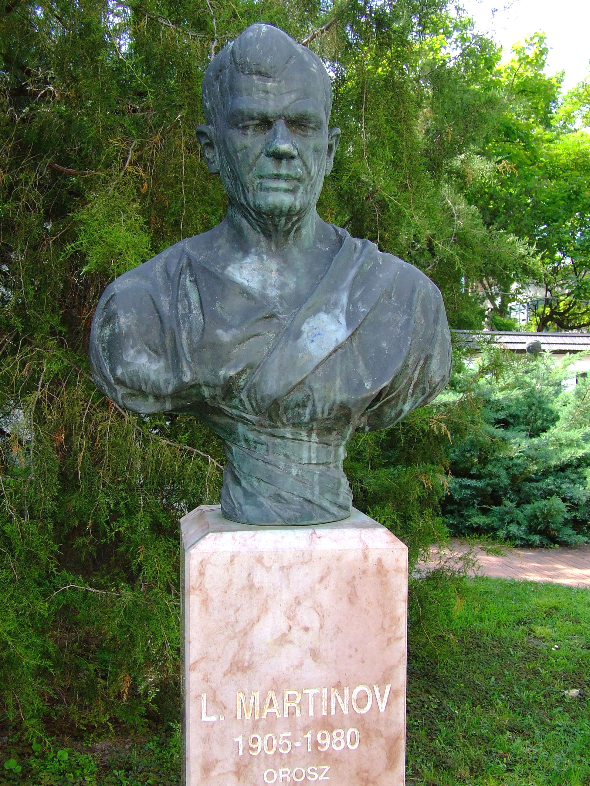 Leonyid Martinov orosz költő, műfordító szobra (Felállítás: 1985, Szabó Tamás) Kiskőrösön, Petőfi Sándor fordítóinak szoborparkjában[1]